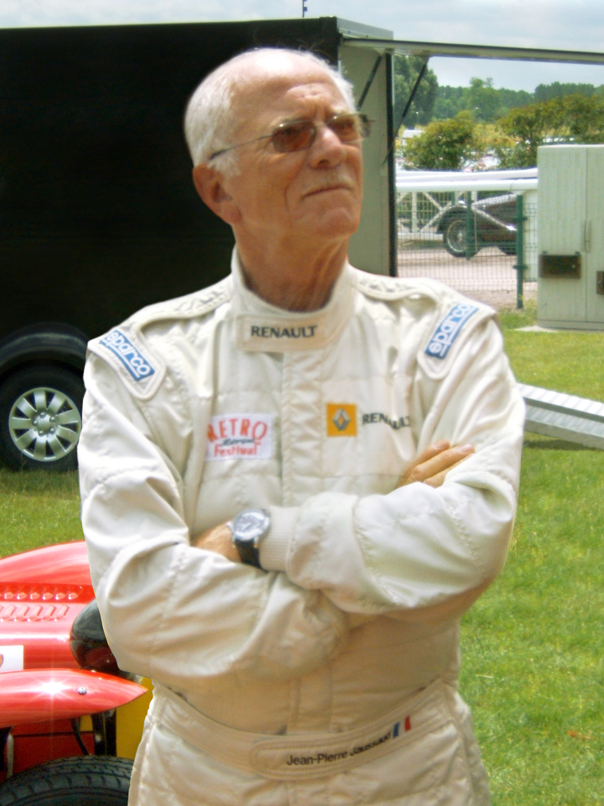 Jean-Pierre Jaussaud le 4 juillet 2009 lors du deuxième Caen Rétro Festival.